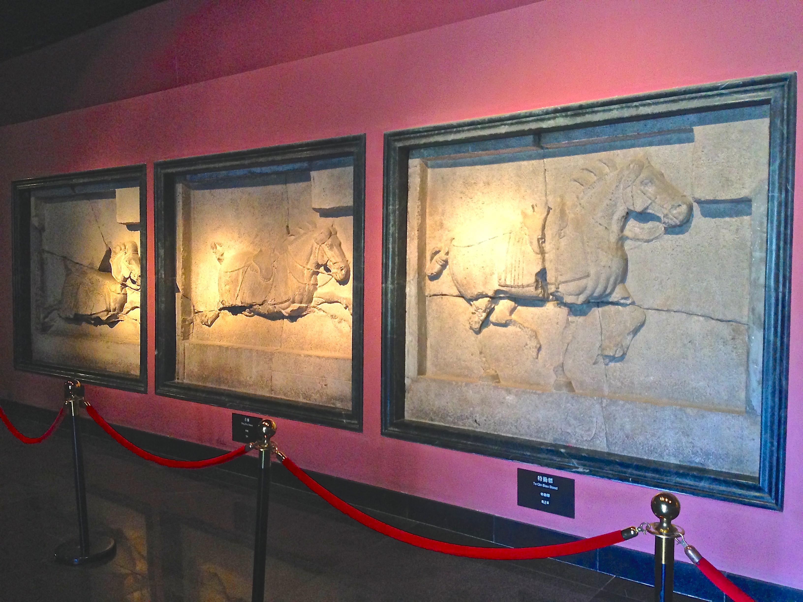 Sex hästar från Zhaoling mausoleum på Xi'an Beilin Museum